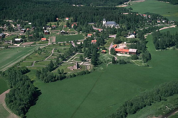 Selångers kyrkoruin (fornlämningsnummer, RAÄnr 2487:86) i bildens mitt. Motiv: Selånger Nyckelord: Flygbilder, Riksintressen Kategori: KyrkbySelångers kyrkoruin (fornlämningsnummer, RAÄnr 2487:86) i bildens mitt.